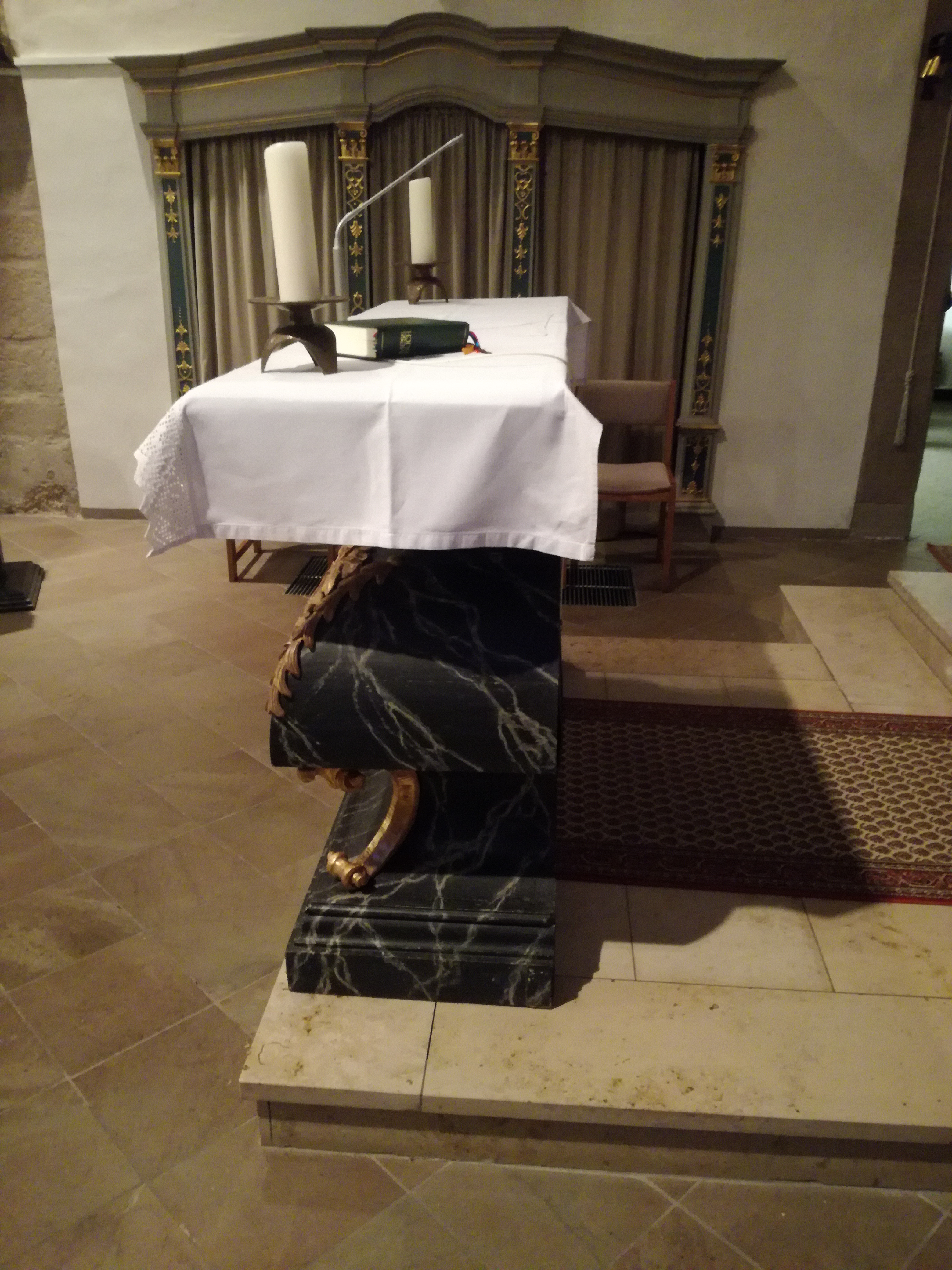 Der "halbierte" Volksaltar in St. Kilian Welda, von der Seite aus fotographiert.This is a photograph of an architectural monument., no. 0